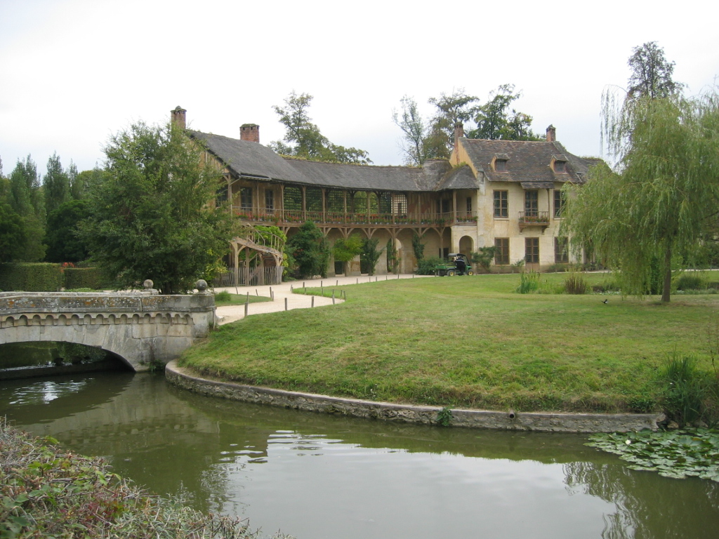 Maison de la Reine et Maison du billard au Hameau de la Reine - Versailles